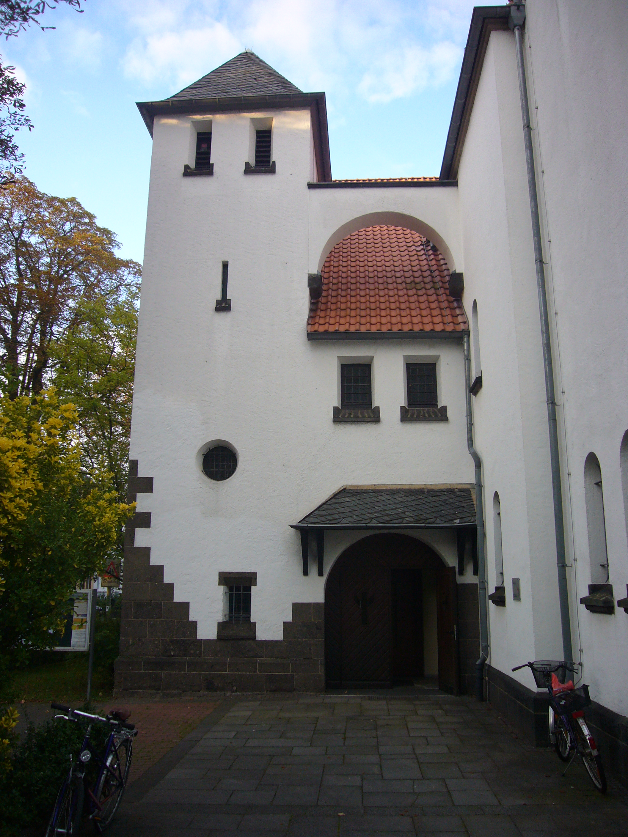 Die katholische Pfarrkirche Herz-Jesu in Bad Godesberg, Beethovenallee, Godesberg-Villenviertel